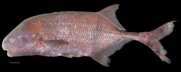 Ivindomyrus opdenboschi, hembra, 160 mm, río Ivindo, Gabón. Sullivan JP, Lavoué S, Hopkins CD (2016) Cryptomyrus: a new genus of Mormyridae (Teleostei, Osteoglossomorpha) with two new species from Gabon, West-Central Africa. ZooKeys 561: 117-150.